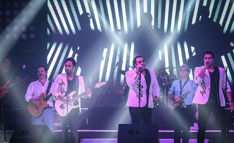 کنسرت گروه سون در کیش